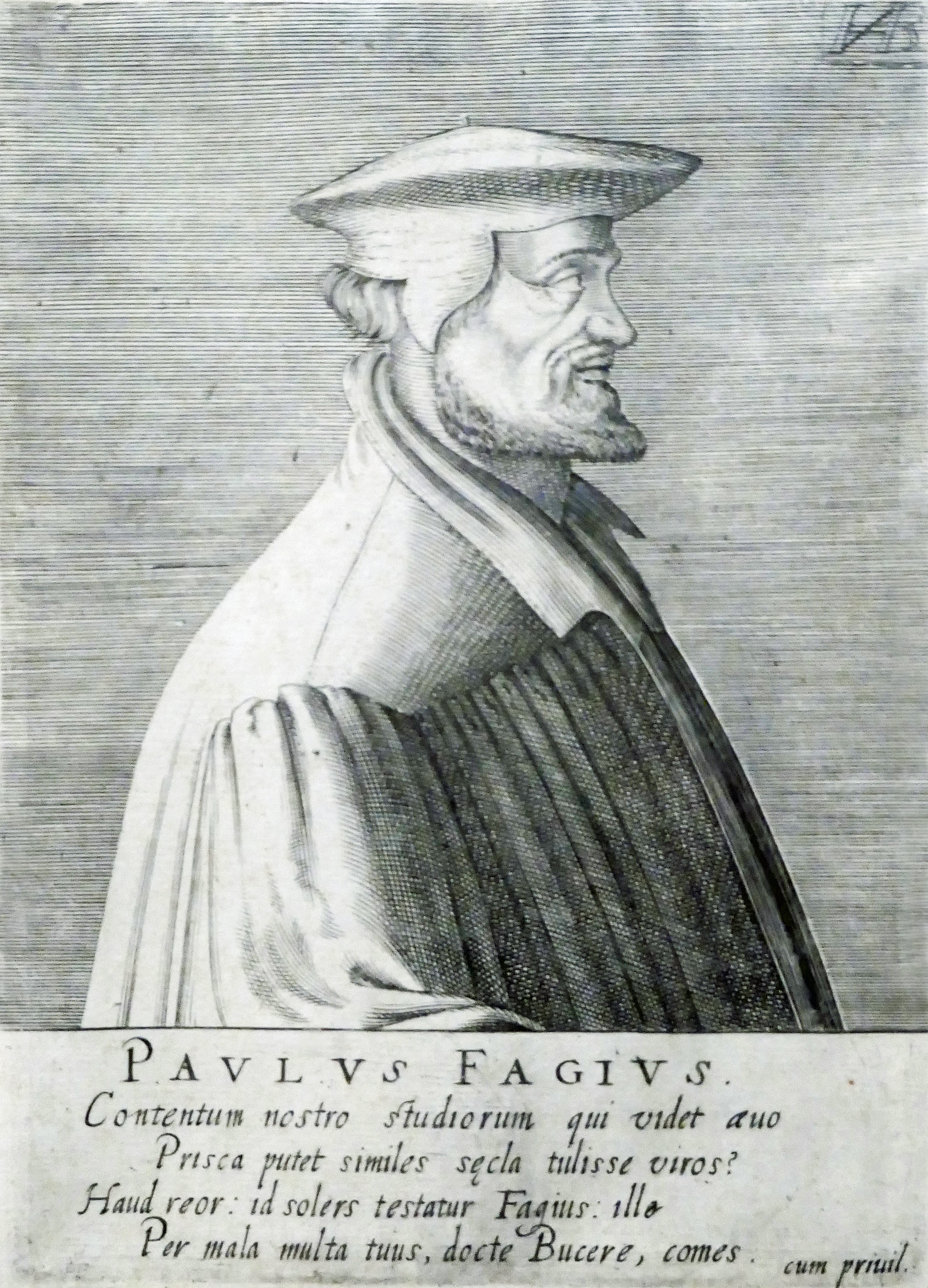 Portrait de Paul Fagius, reproduit dans Praestantium aliquot Theologorum qui Rom. Antichristum praecipue oppugnarunt, "Effigies; quibus addita Elogia, Librorumque Catalogi, 1602